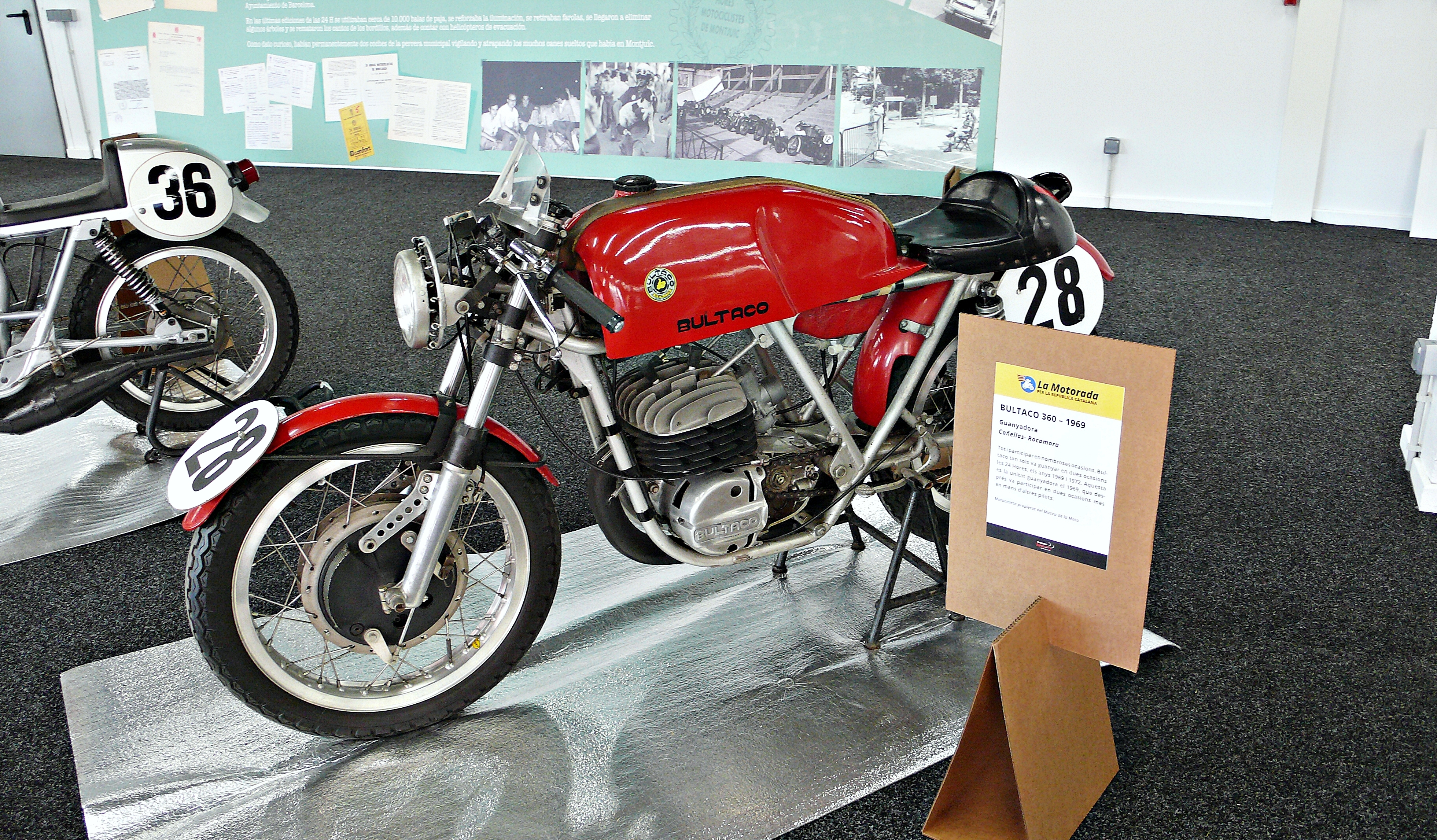 Exposicion motos clasicas 24 Horas de Catalunya